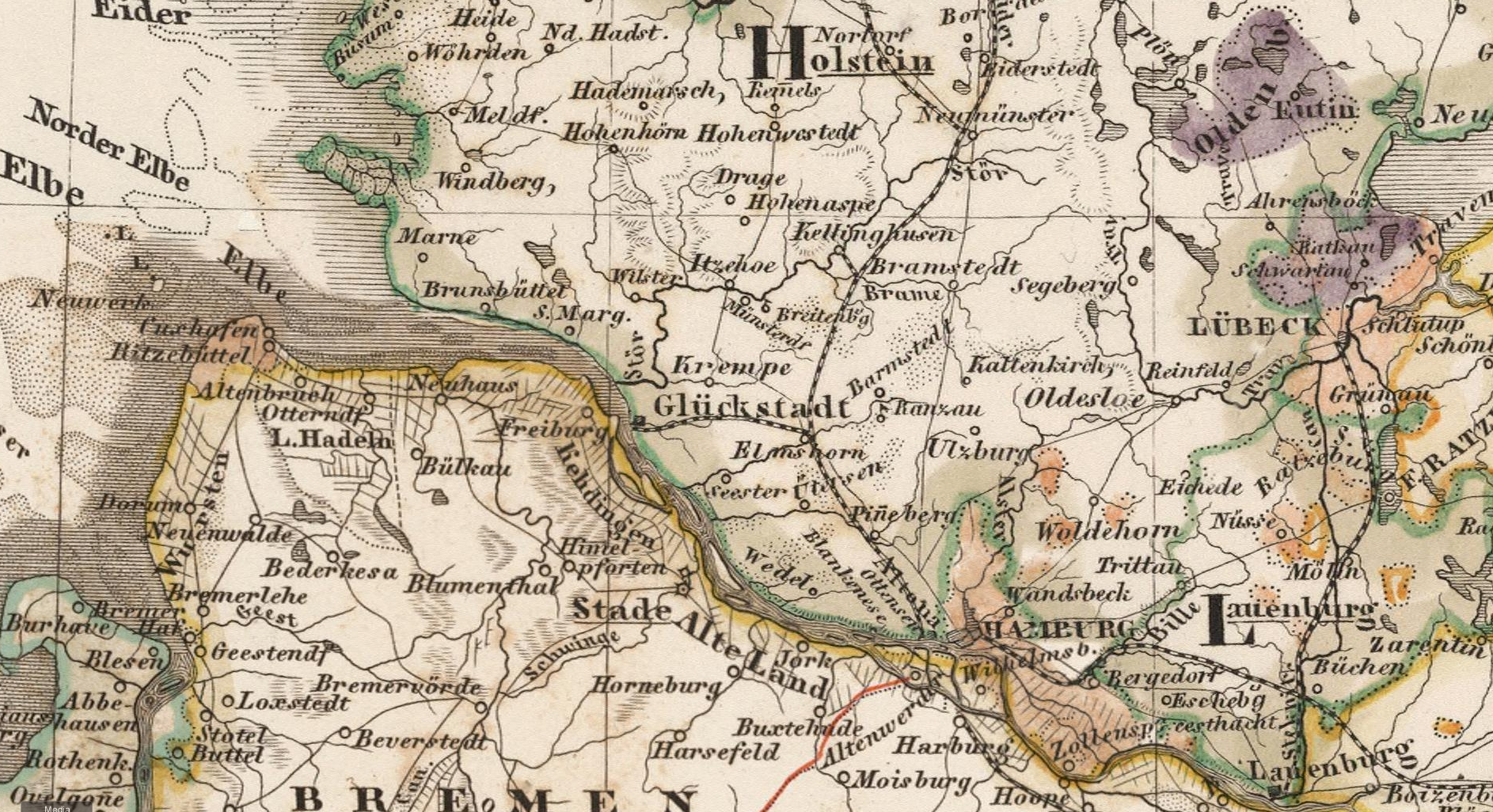 Karte von Norddeutschland von 1850